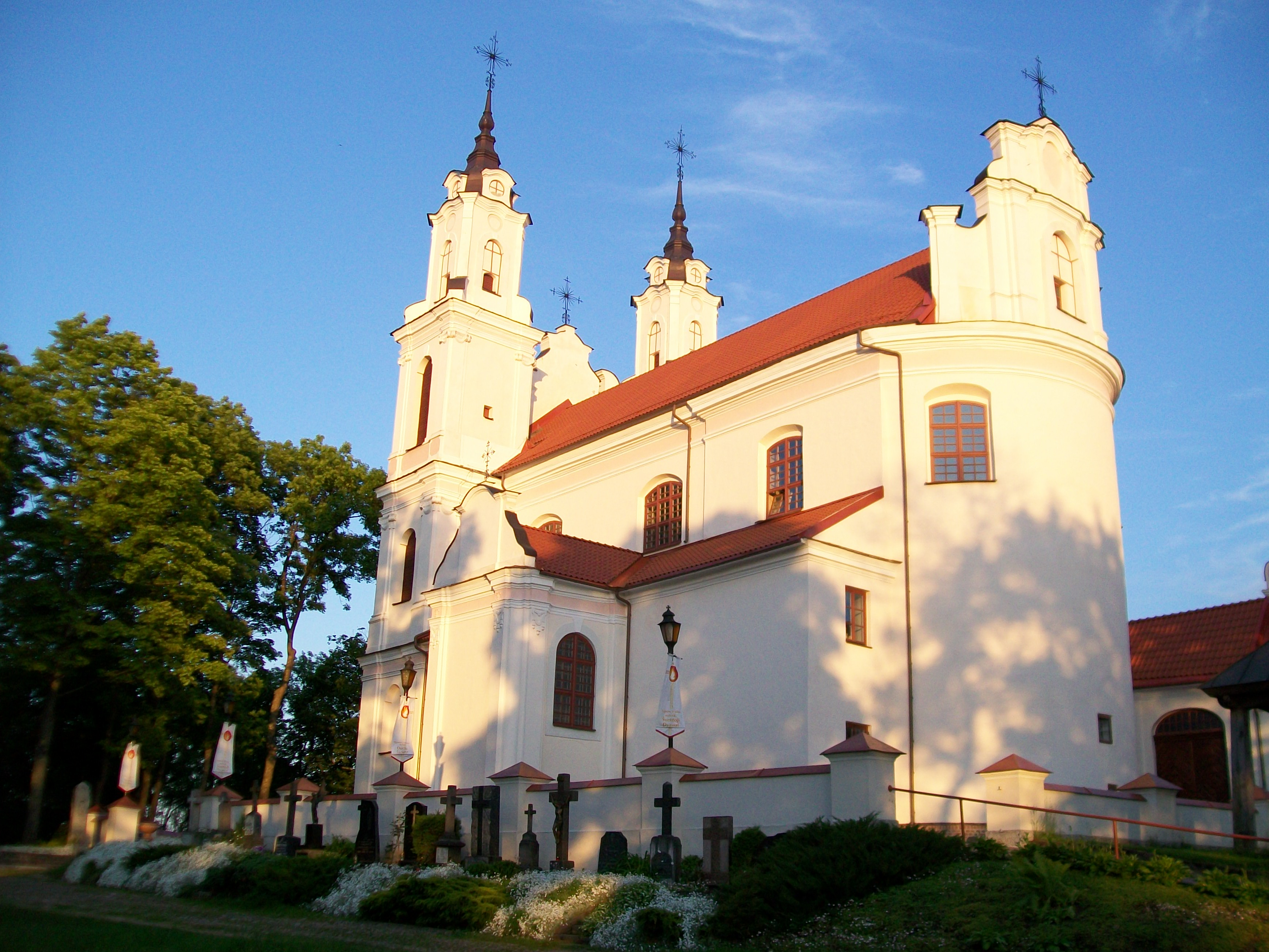 Kalvarijos church in Vilnius, Lithuania